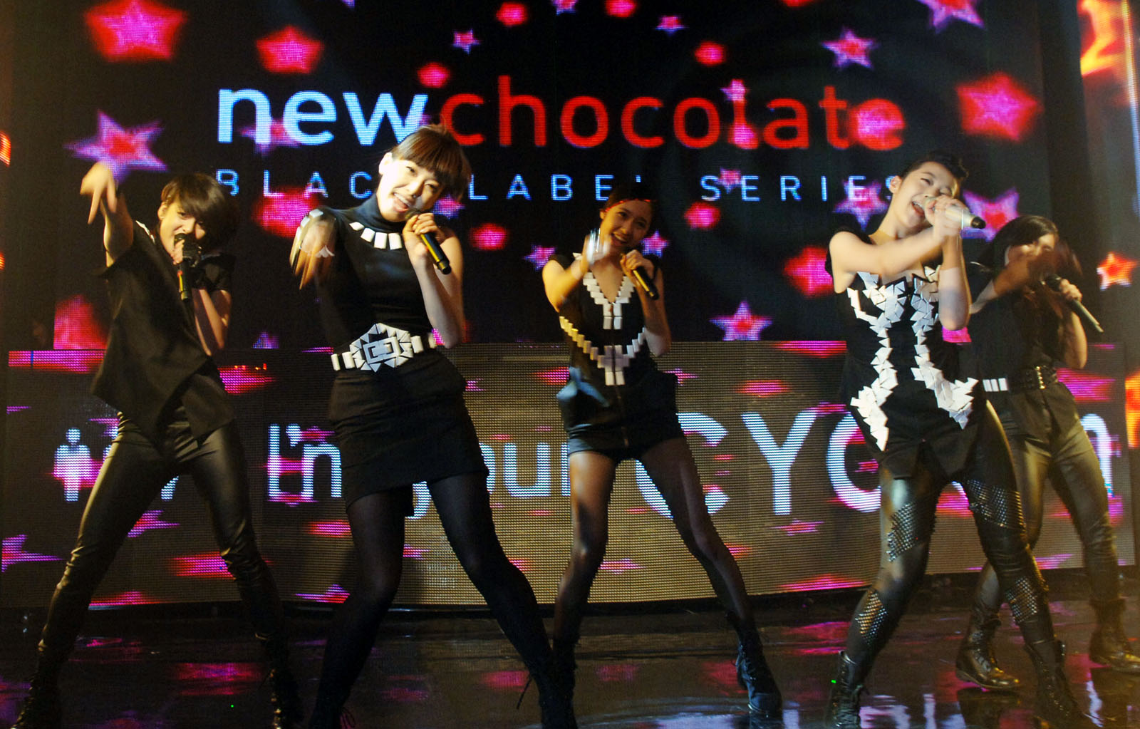 뉴초콜릿폰 쇼케이스